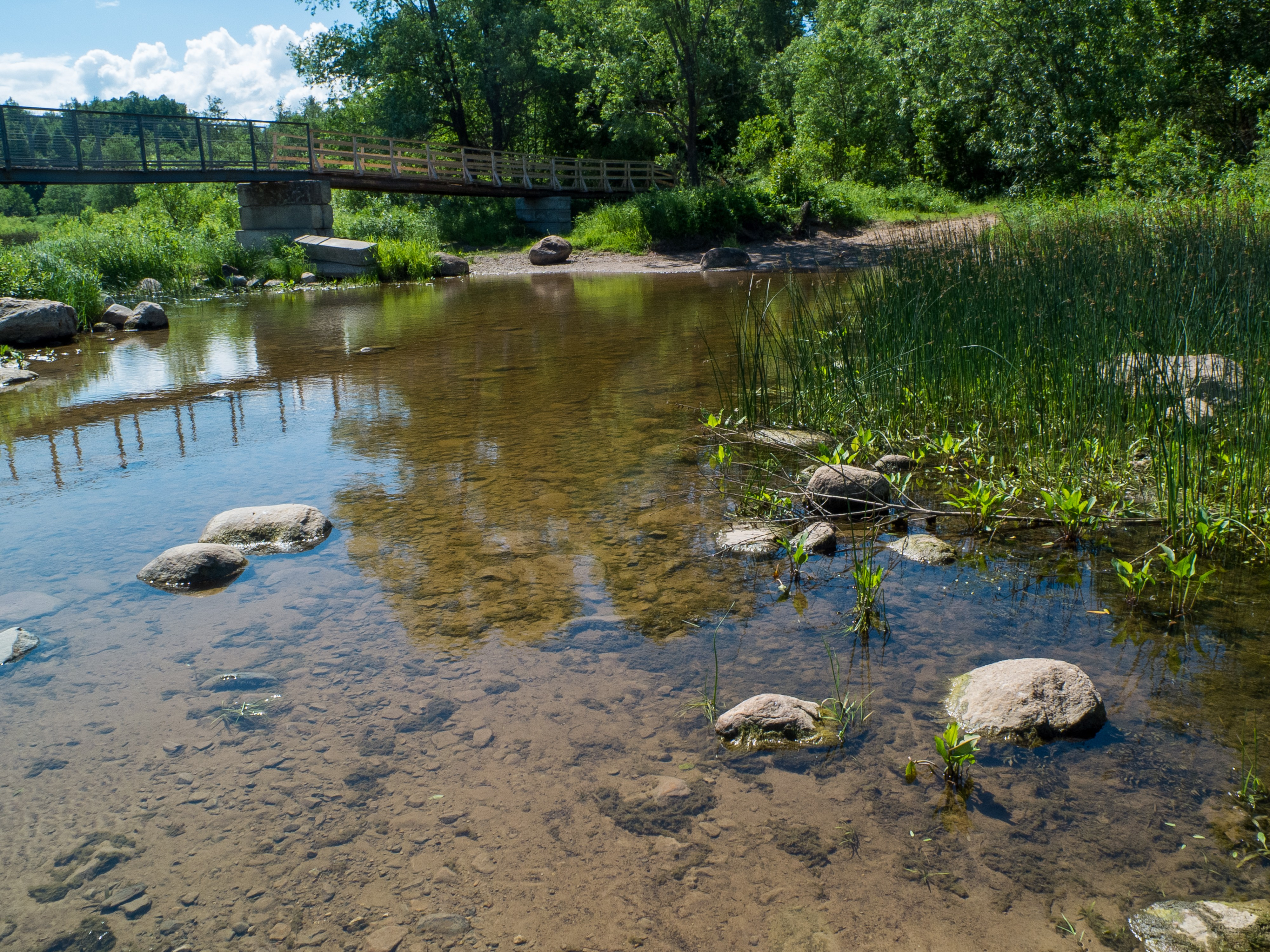 Парк д. Андреевское: Правый берег р. Ильд, д. Андреевское, д. Андреевское, Некоузский район, Ярославская область This image is related to the protected area of Russia number 7610167